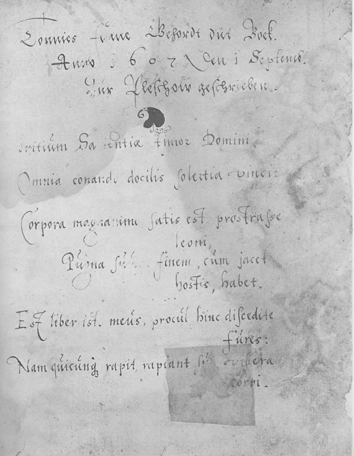 De eerste Siet ut Tönnies Fonne sien Russ’sch-Book.